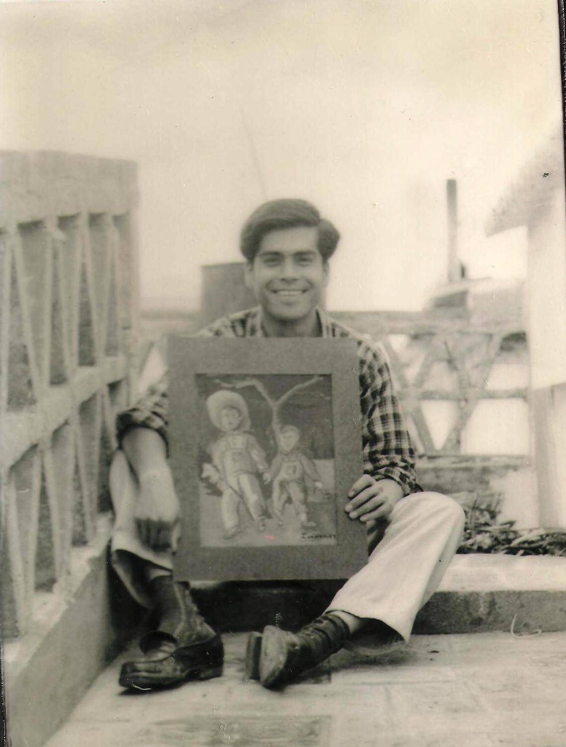 Nicolás Cuéllar mostrando una de sus obras de tradiciones mexicanas, en la terraza de su casa en San Miguel de Allende